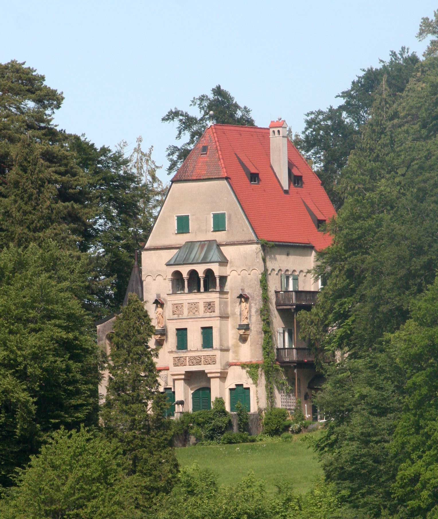 Villa Rösl in Ammerland am Starnberger See, vom Schiff aus fotografiert